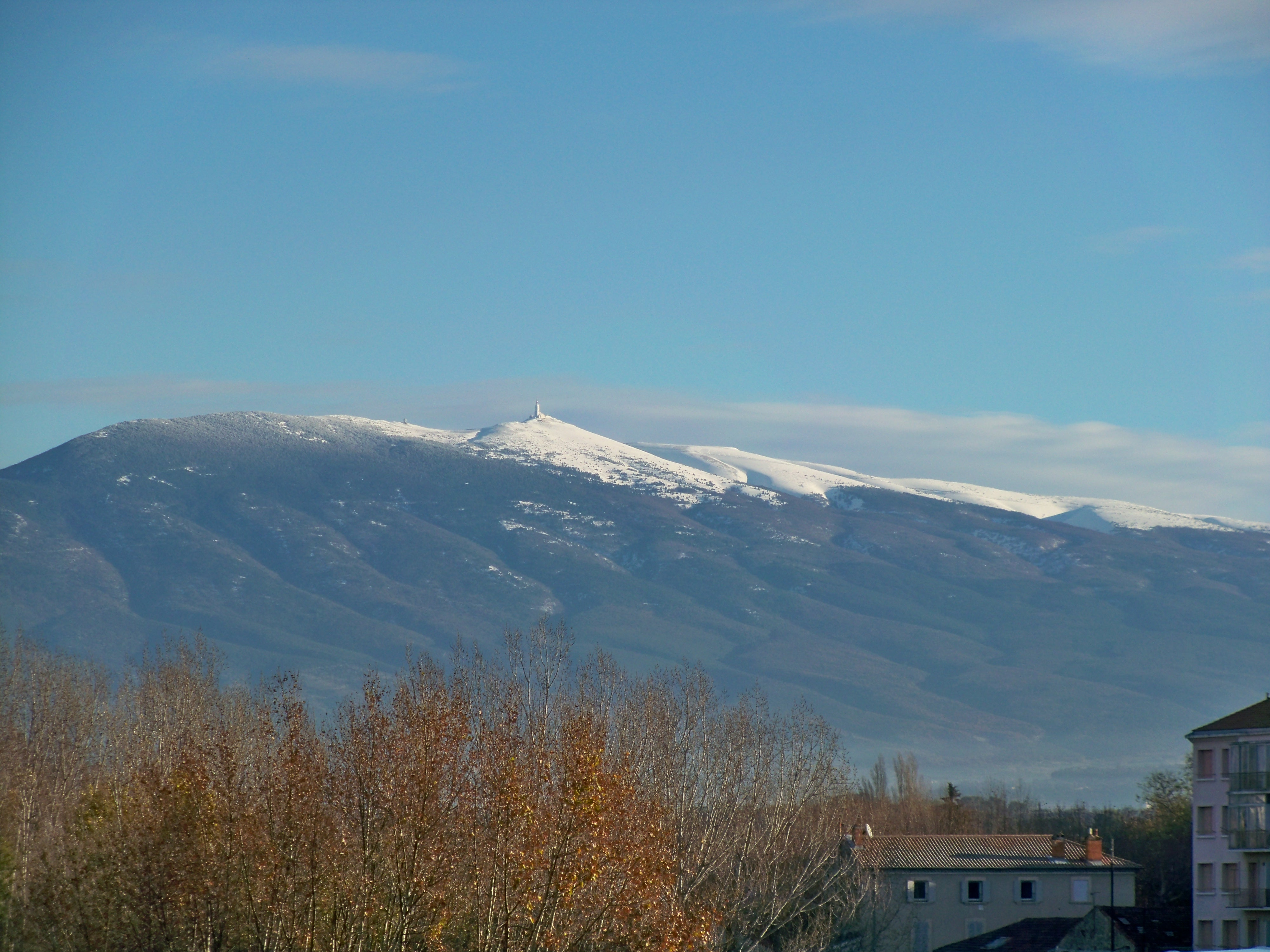 Le Mont Ventoux, vue de Carpentras, Vaucluse, France